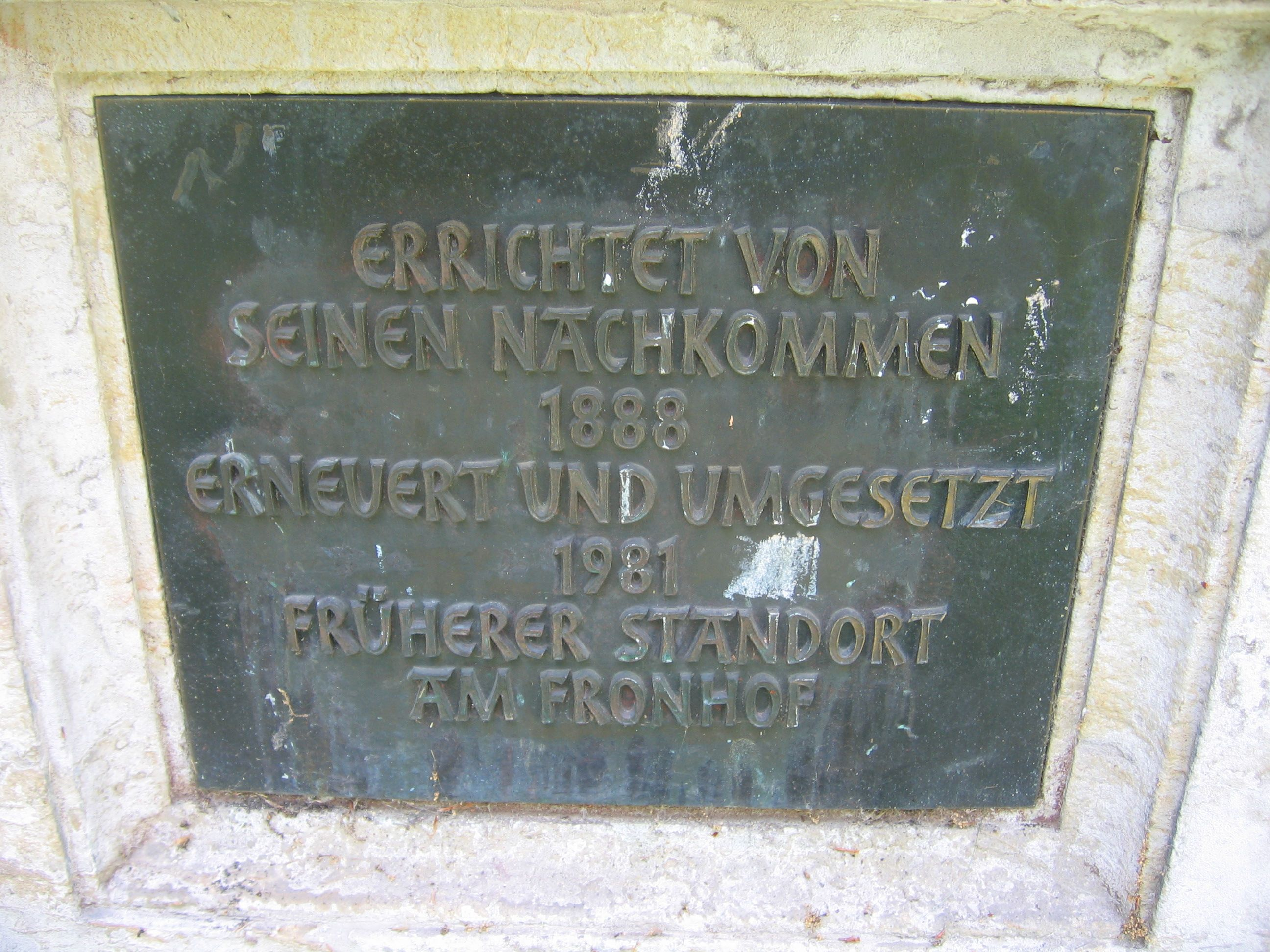 Gedenkstein für Winter von Güldenbronn in Hanau